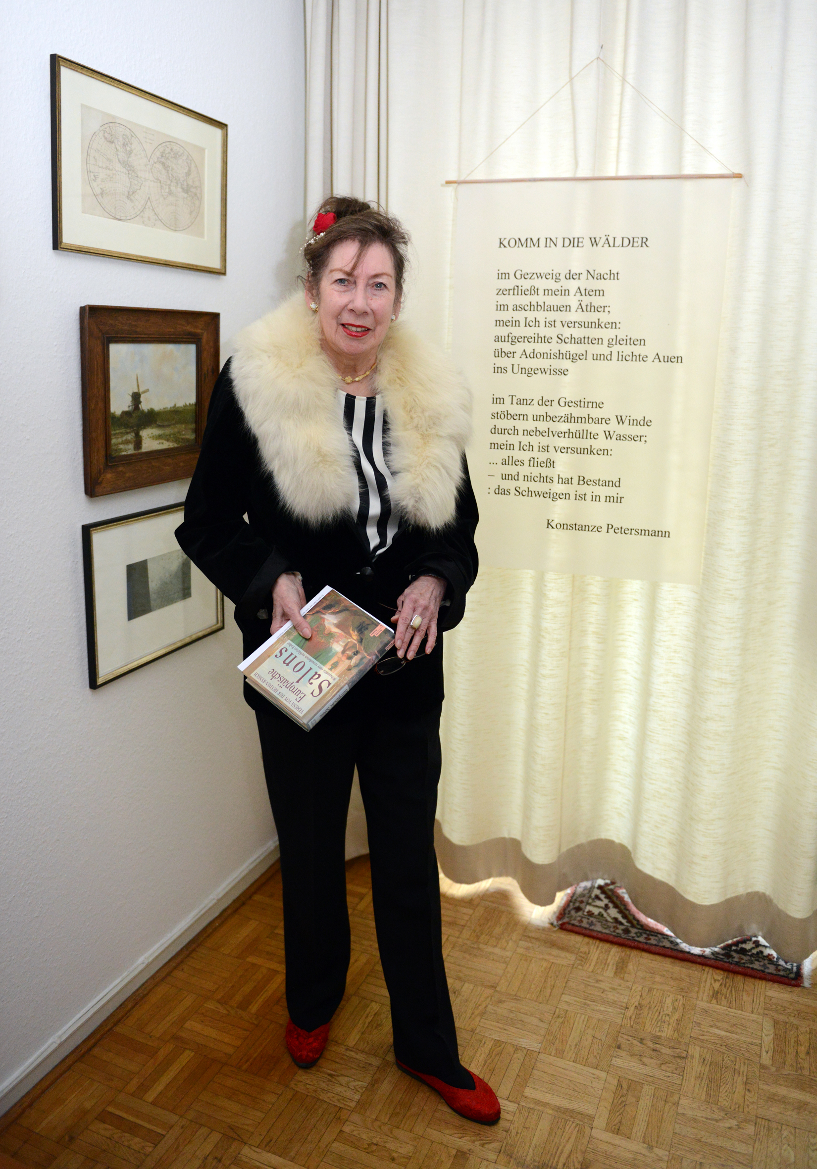 Konstanze Petersmann Portrait mit Salon-Buch